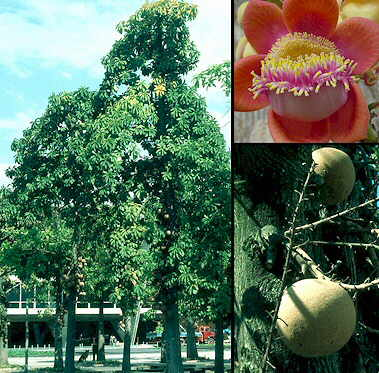 Foto de la bala de cañón